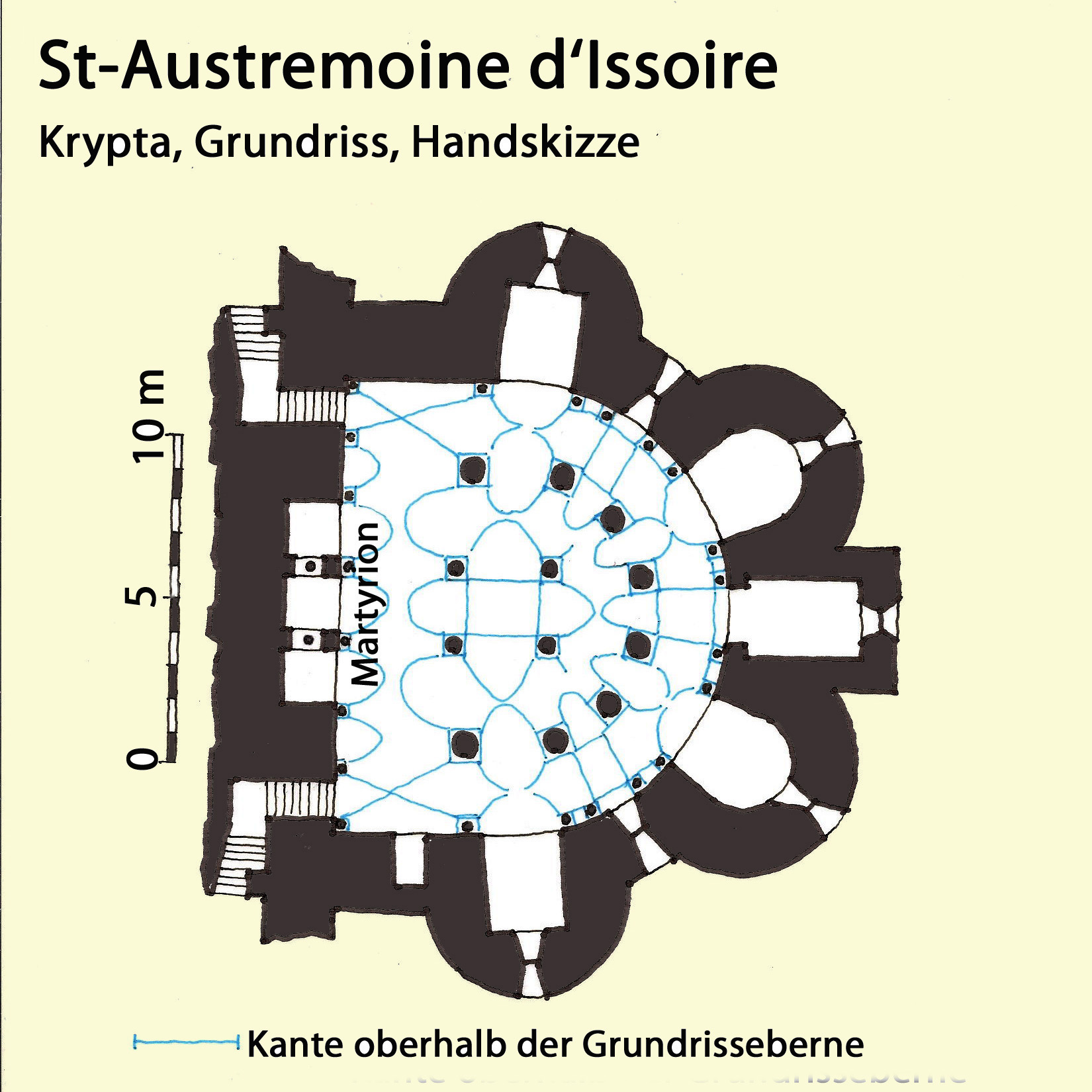 St-Austremoine_d'Issoire.Krypta, Grundriss, Handskizze